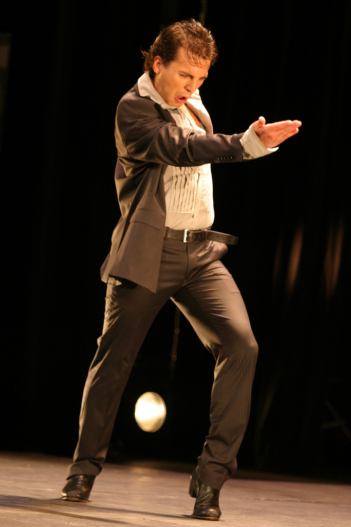 Marco Flores, premios especiales de Baile, premio carmen Amaya, premio mario Maya, premio Antonio gades en la edición del 2007.